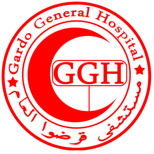 Gardo General Hospital logo.